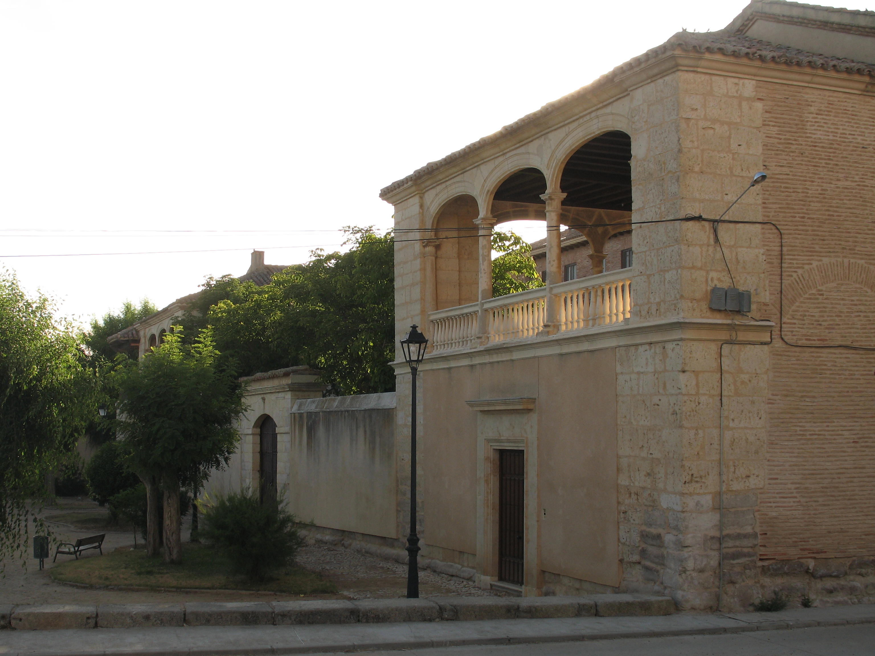 Vista desde el exterior.